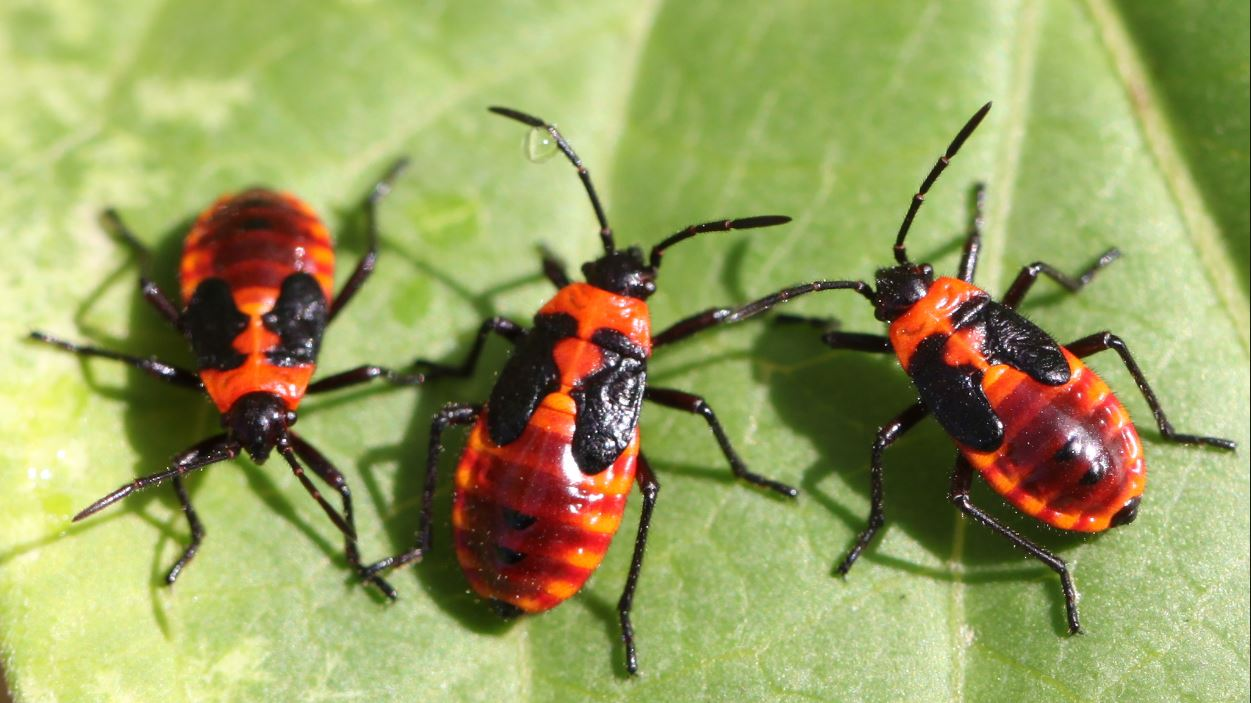 Nymphen der Schwalbenwurzwanze (Tropidothorax leucopterus) am 27.7.2016 im Schwetzinger Hardt